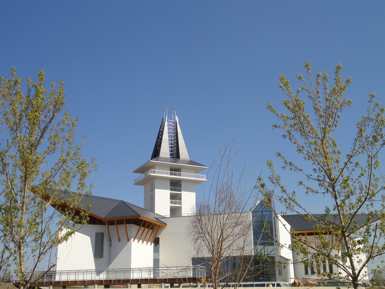 Főépület